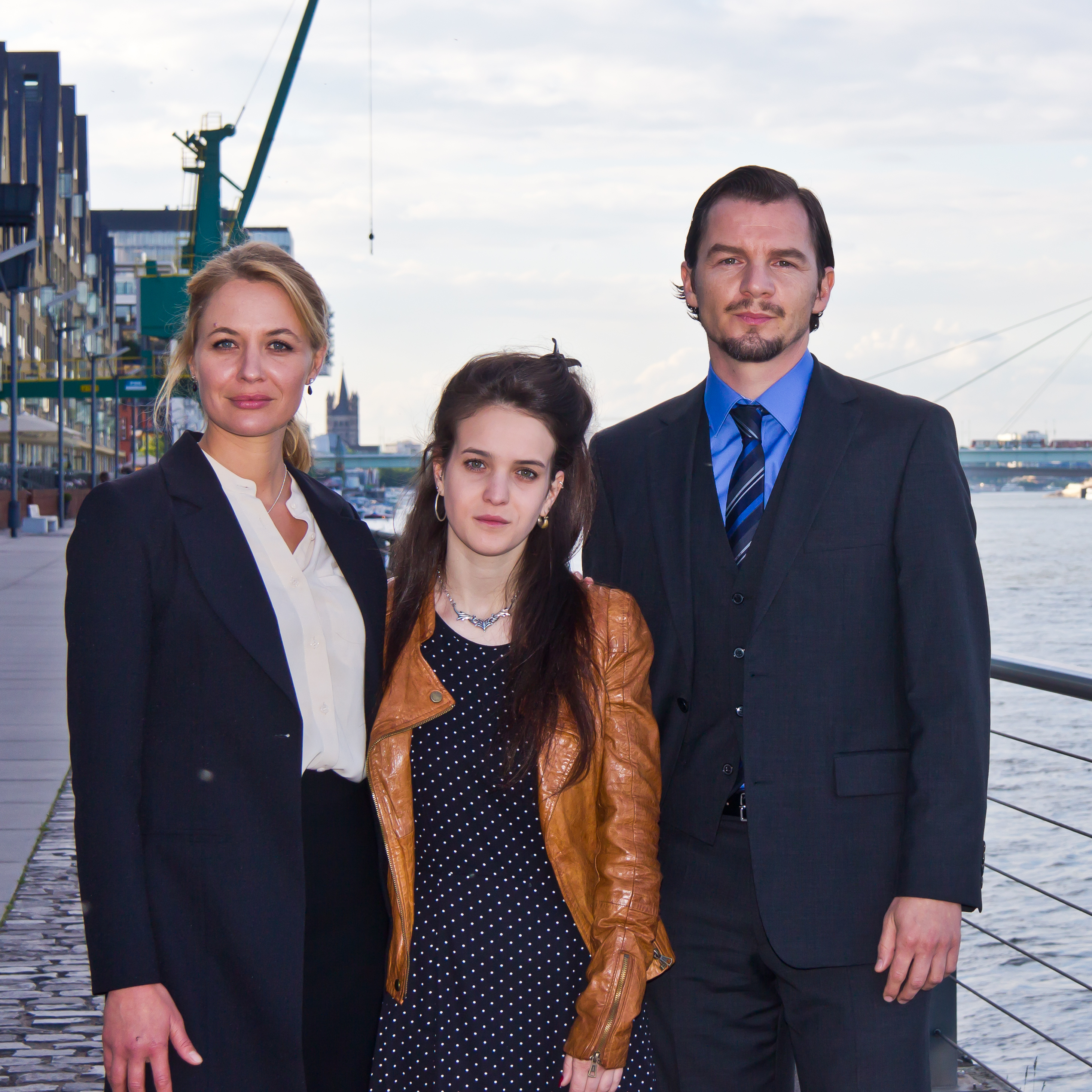 Set-Termin zum WDR/ARD-Fernsehfilm „Momentversagen“ Foto: Julia Thurnau, Lili Zahavi, Felix Klare